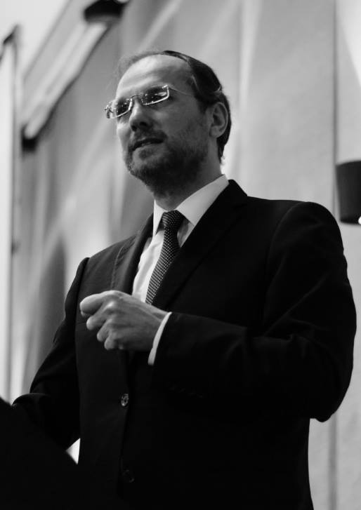 Gran Rabino Isaac Sacca